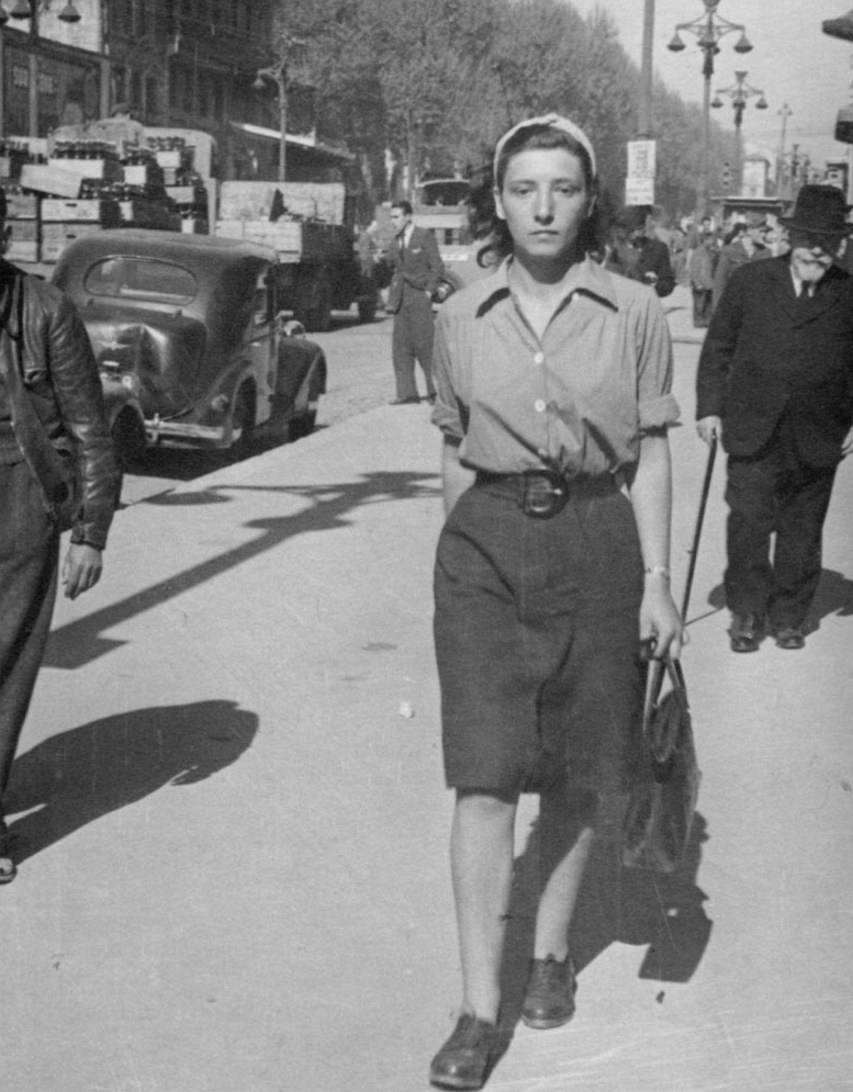 Mélanie Berger auf der ehemaligen Prachtstraße "La Canebière" in Marseille im April 1946